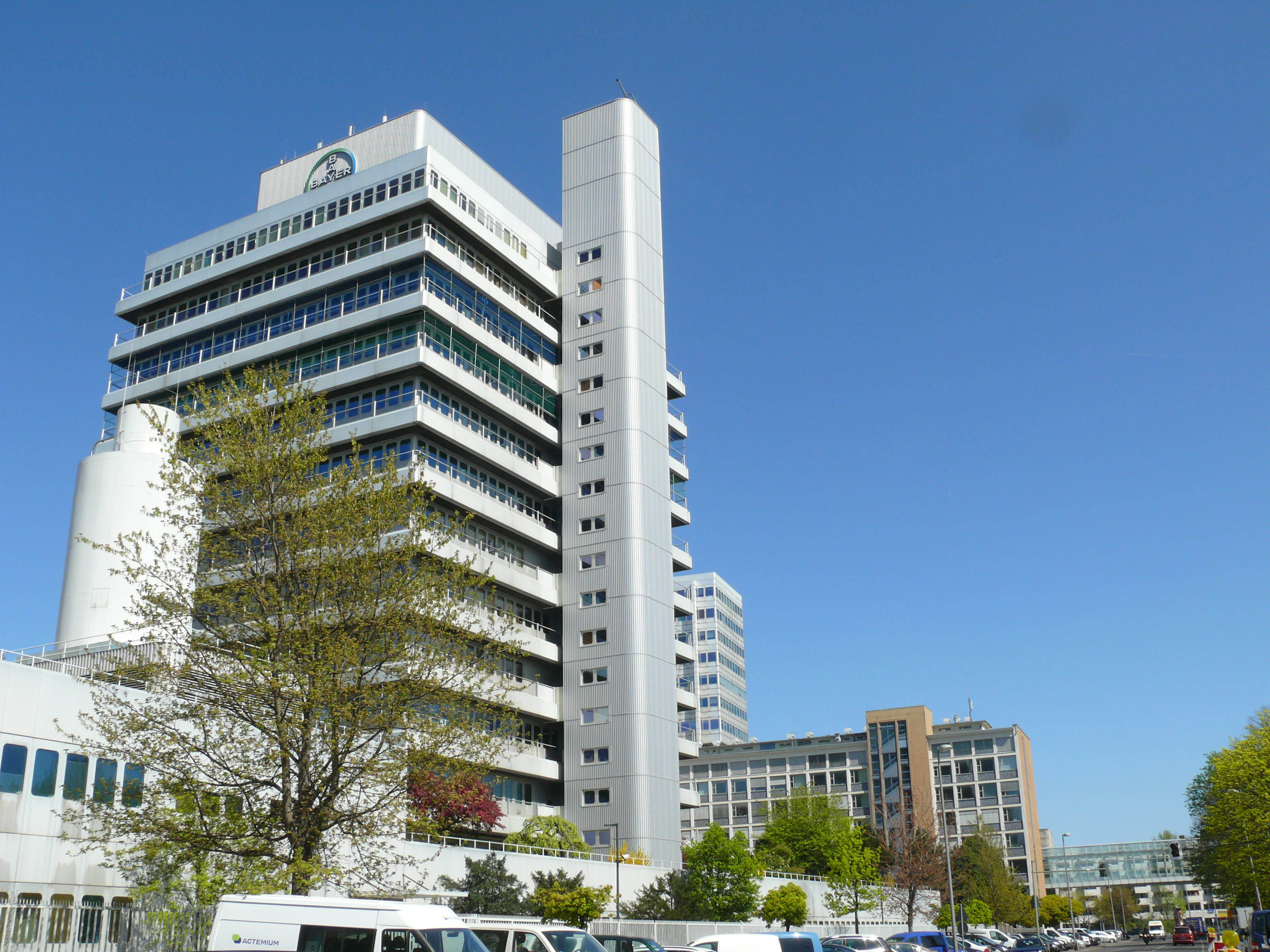 Berlin-Wedding Fennstraße Scherig-Hochhaus